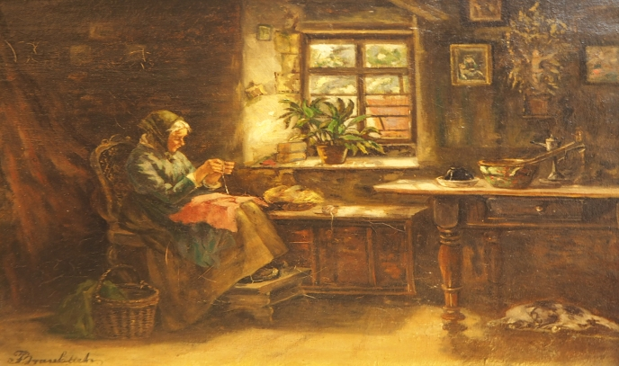 Ida Braubach: Bei der Handarbeit Links unten signiert I. BRAUBACH